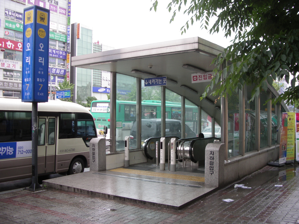 오리역 7번출구